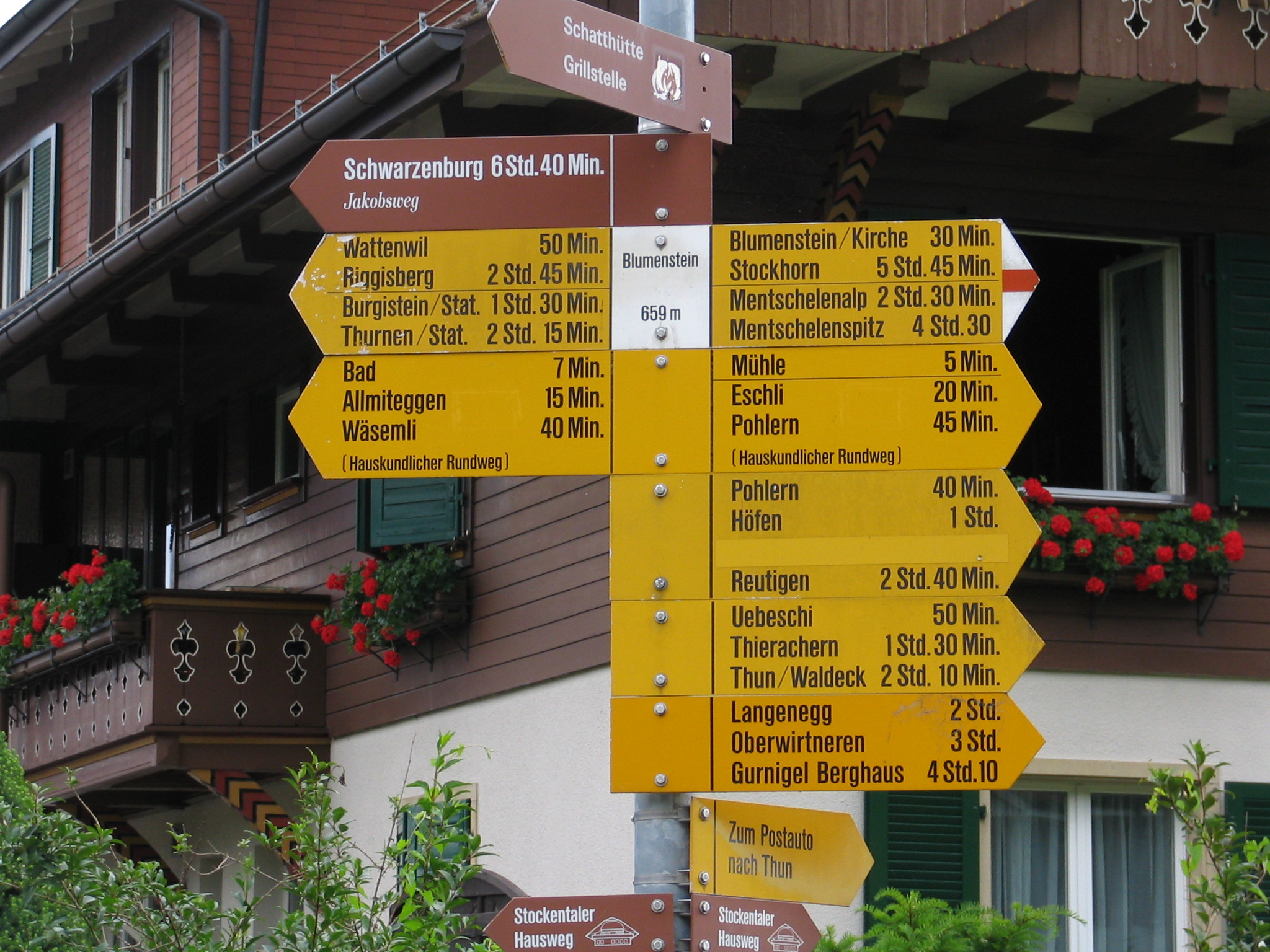 Blumenstein (Kanton Bern, Schweiz/Switzerland), Wanderwegweiser mit durchschnittlichen Zeitangaben in Stunden und Minuten